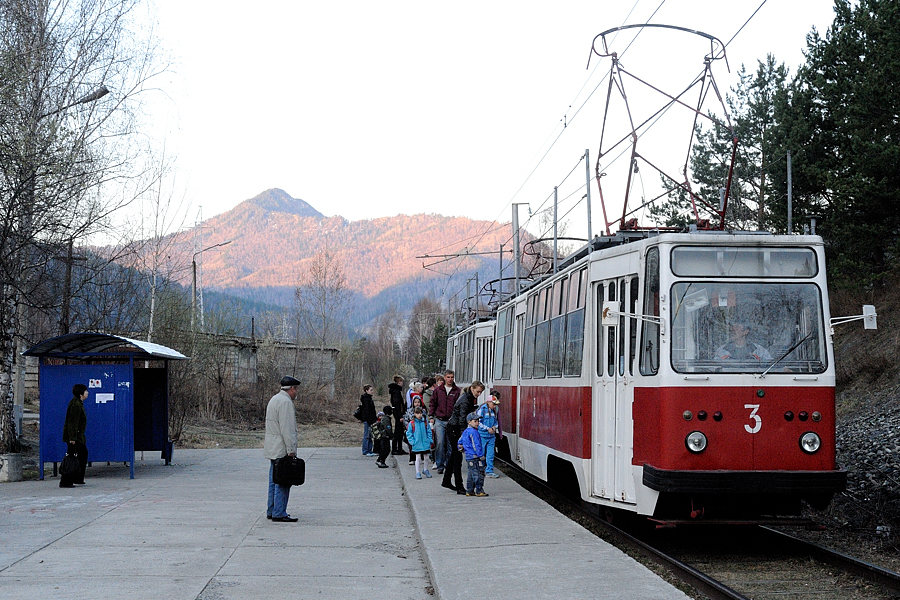 71-88G 3 und 1 in Tscherjomuschki